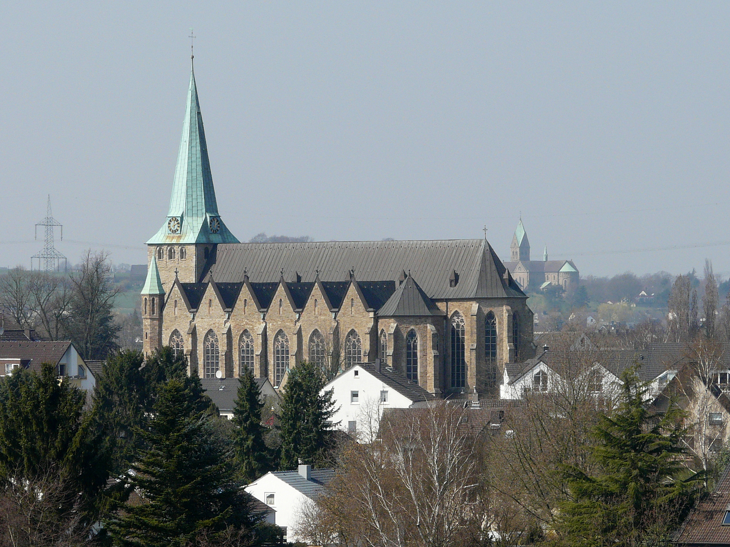 St. Mauritius, Hattingen-Niederwenigern, wegen seiner Größe auch Mauritiusdom genannt; im Hintergrund die Herz-Jesu-Kirche in Burgaltendorf (Essen)